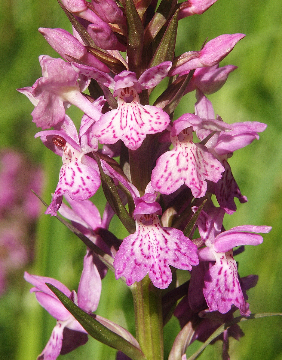 Dactylorhiza × braunii, Schwäbisch-Fränkischer Wald, Germany (Dactylorhiza fuchsii × majalis)